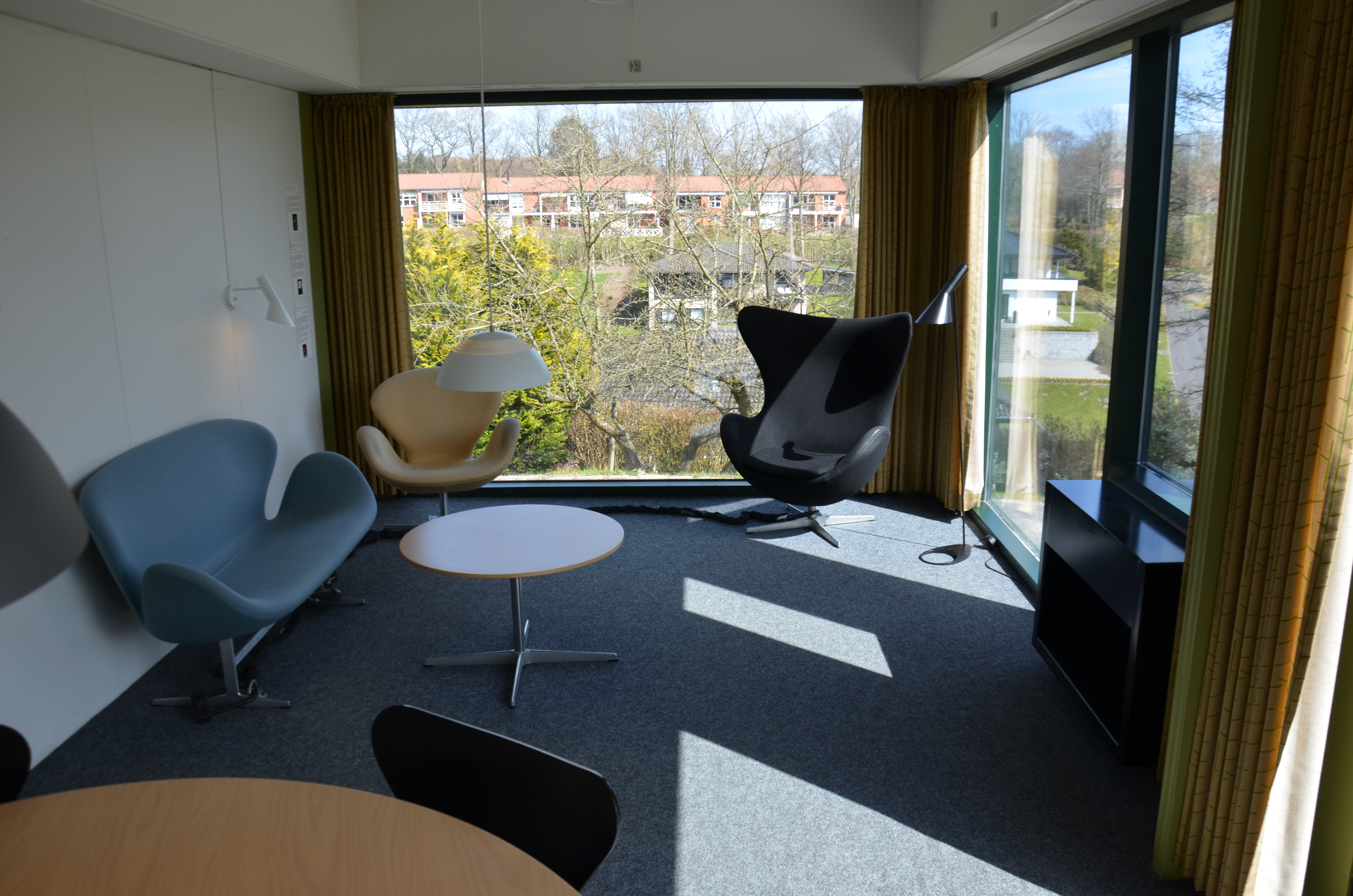 Arne Jacobsen's Kubeflex, interior